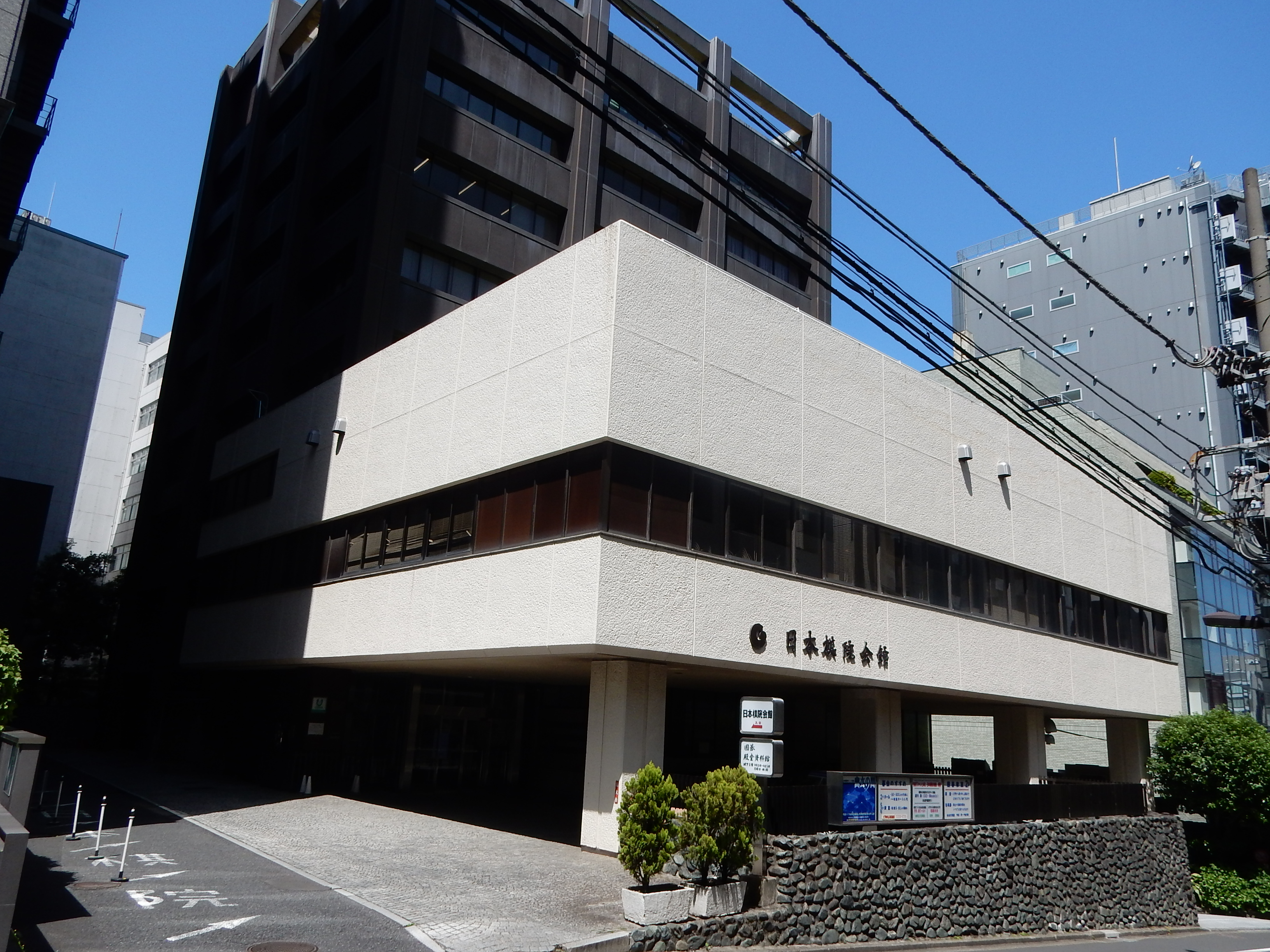 日本棋院会館（日本棋院東京本院が所在）。東京都千代田区五番町7-2